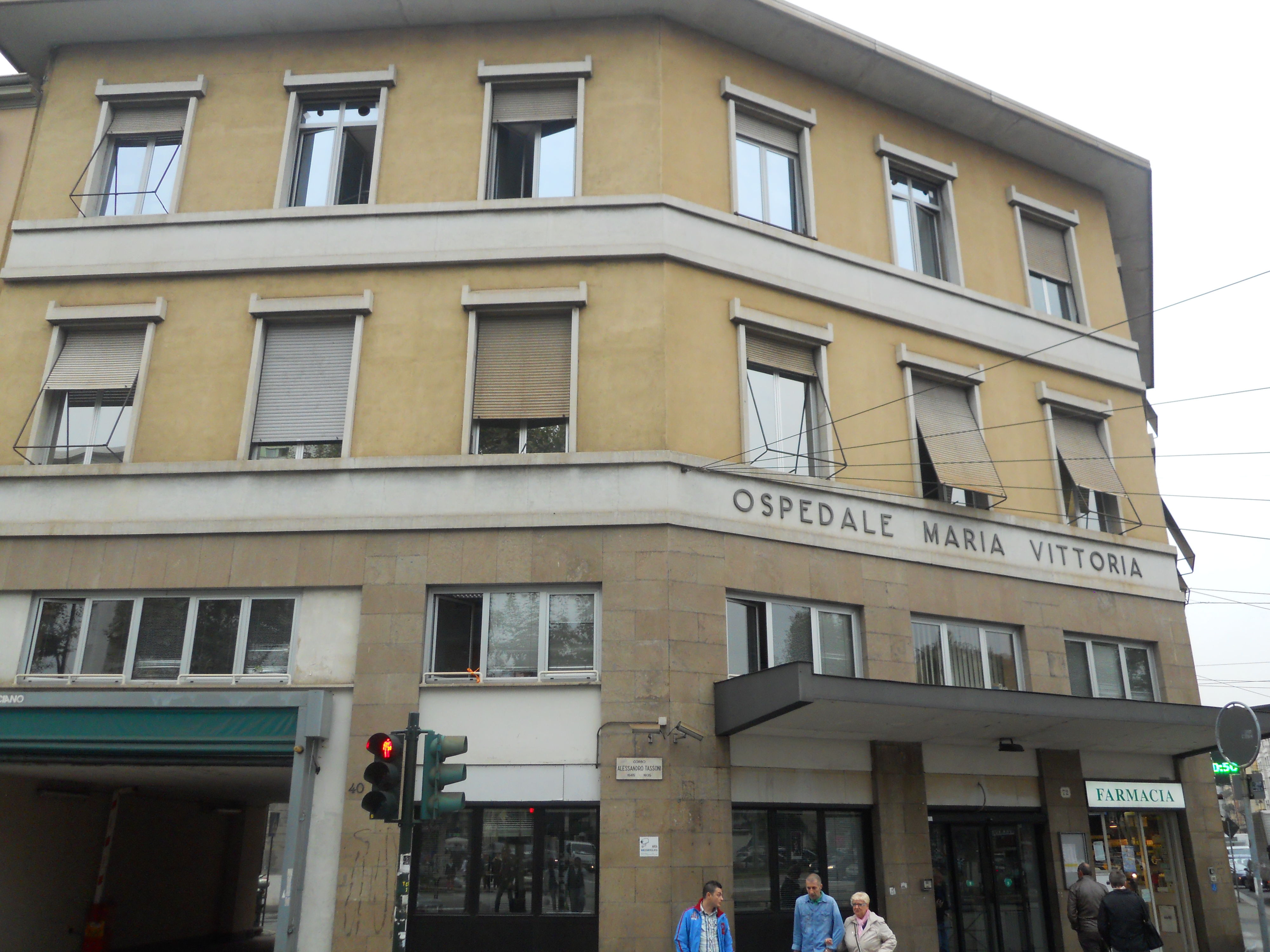 Ingresso Ospedale "Maria Vittoria"